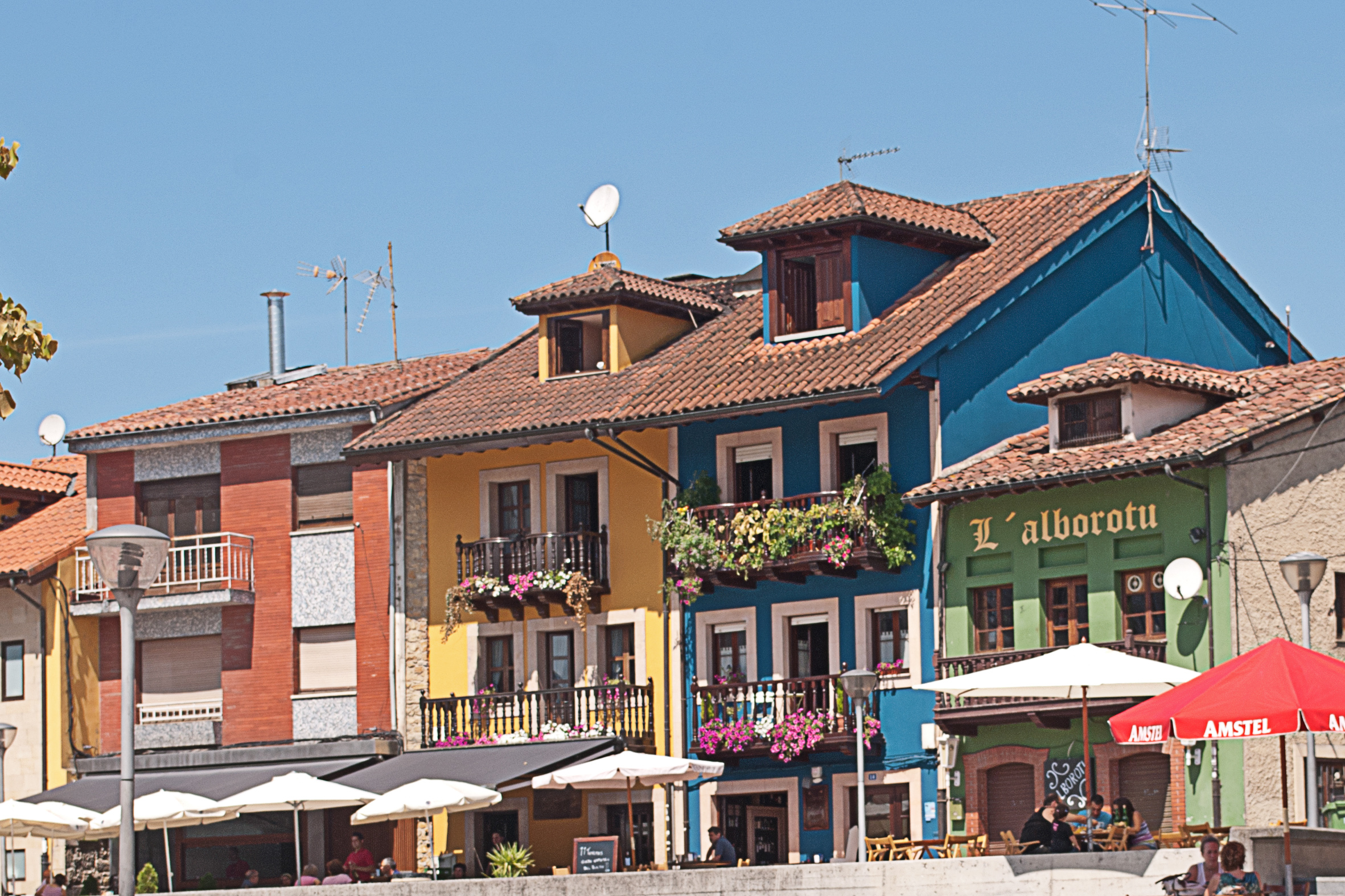 Vista del centro de la Pola de Siero, Asturias. España